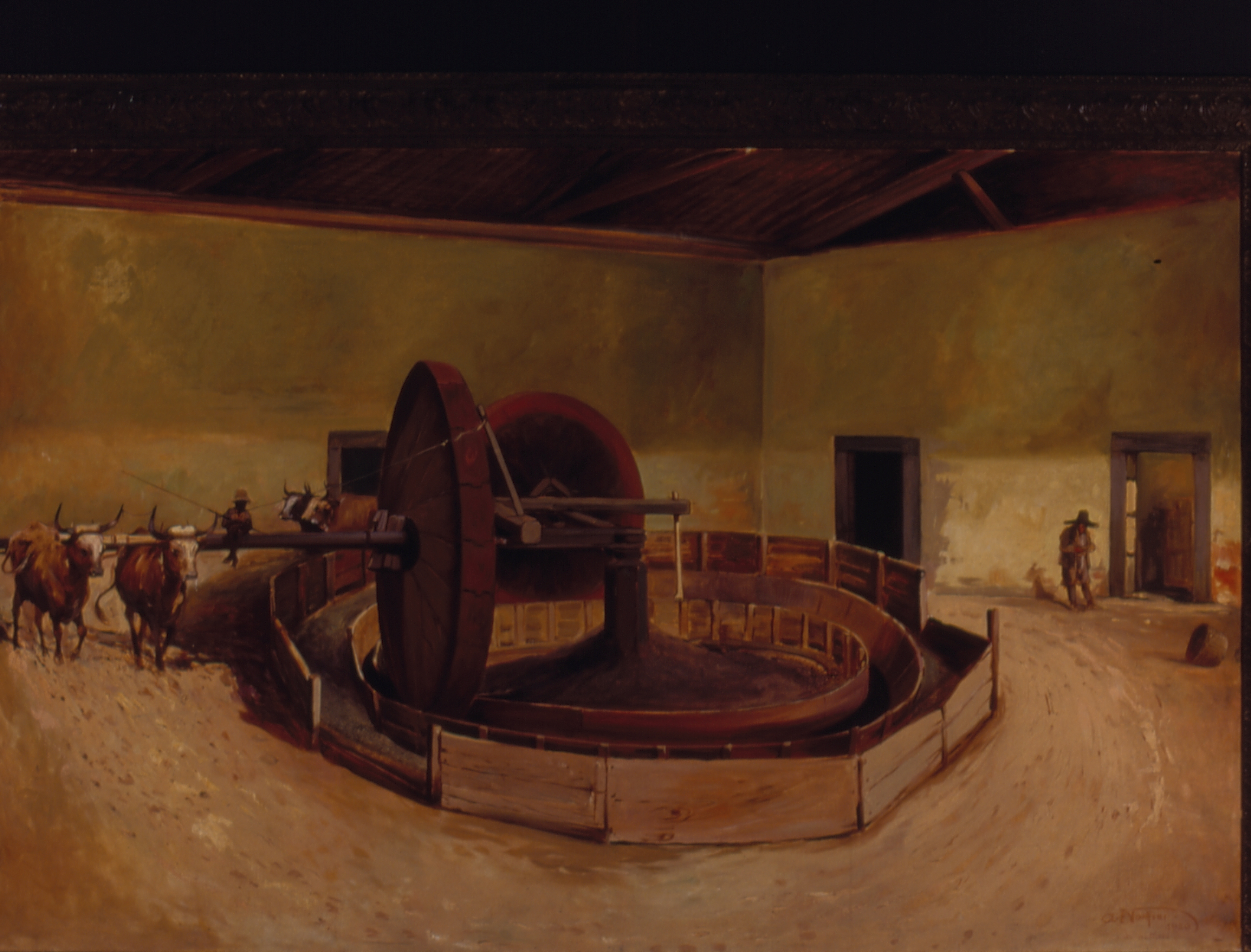 Obra que integra o acervo do Museu Paulista da USP. Coleção Fundo Museu Paulista - FMP